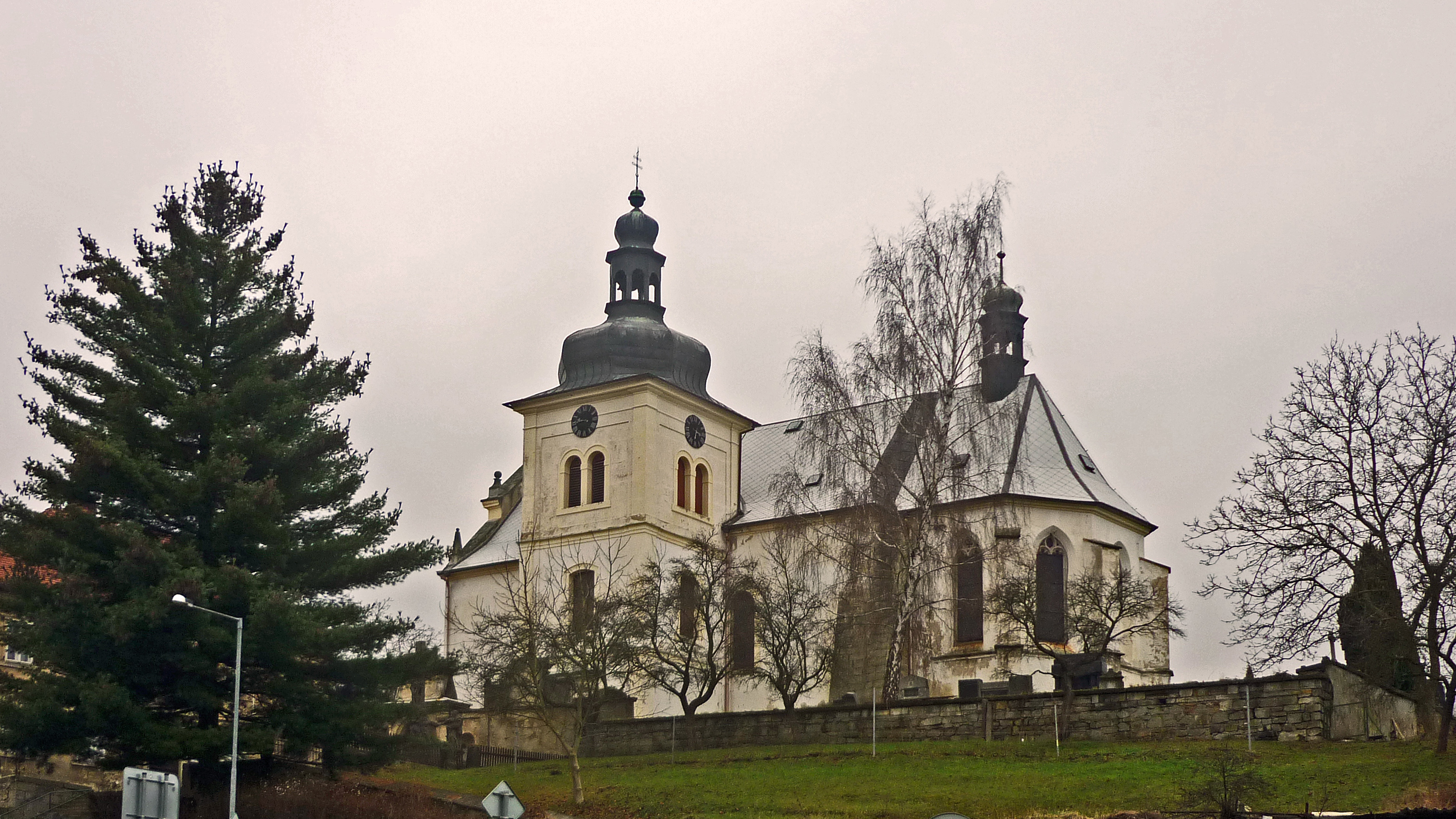 Dreikönigskirche in Königswald (Libouchec)